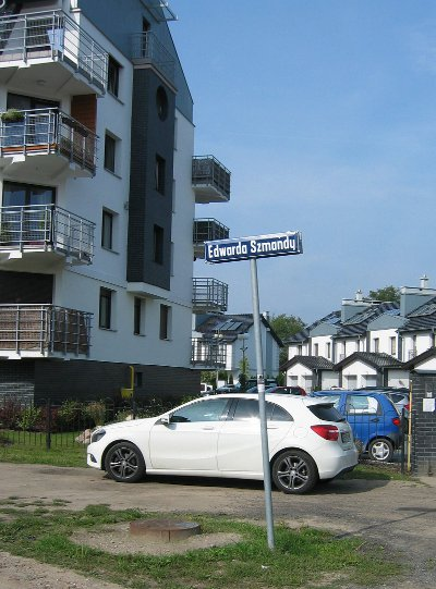 Tablica na ulicy Edwarda Szmańday w Bydgoszczy